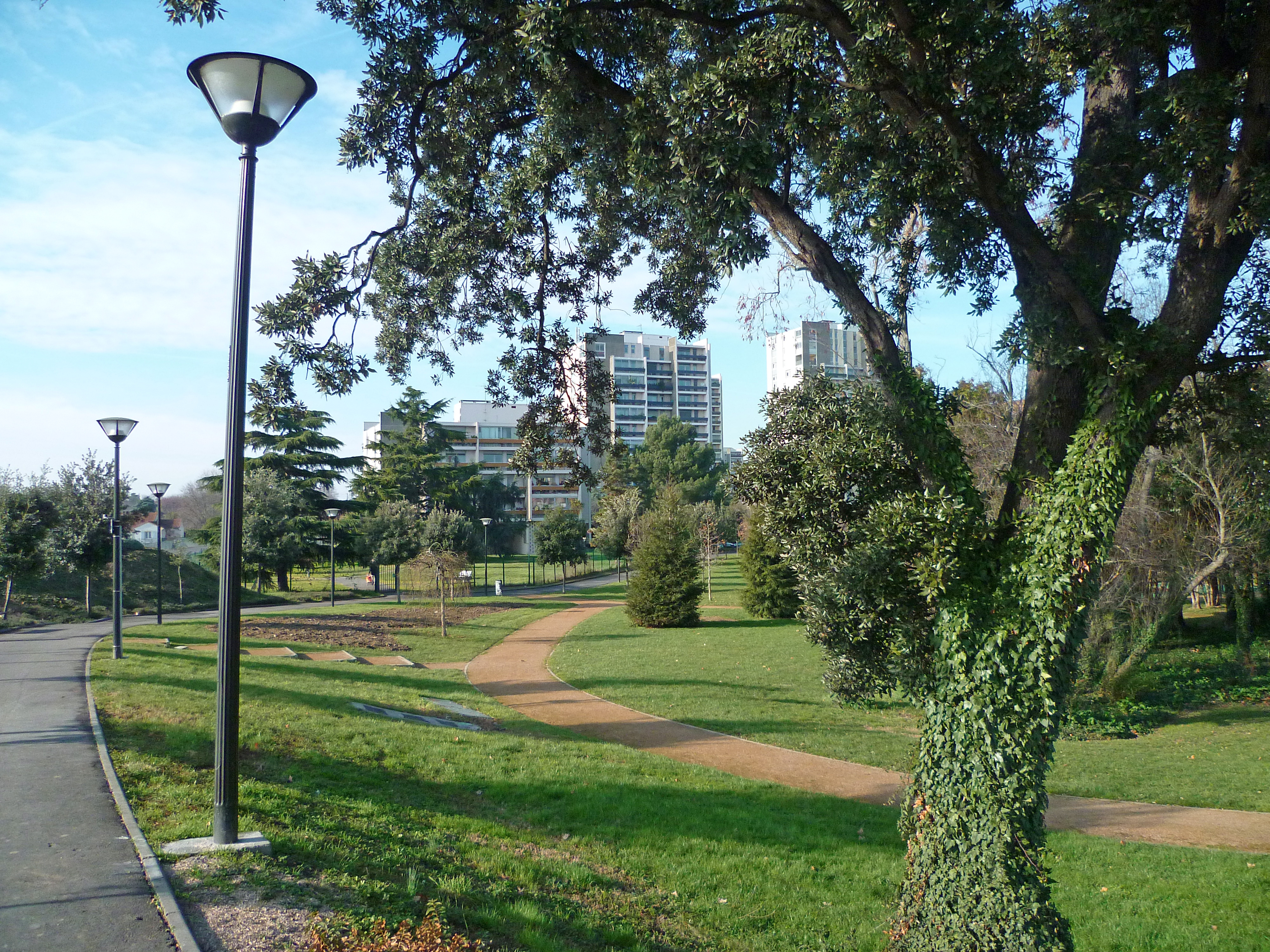 Toulouse, Haute-Garonne, France : Jardin Yves Bergougnan.